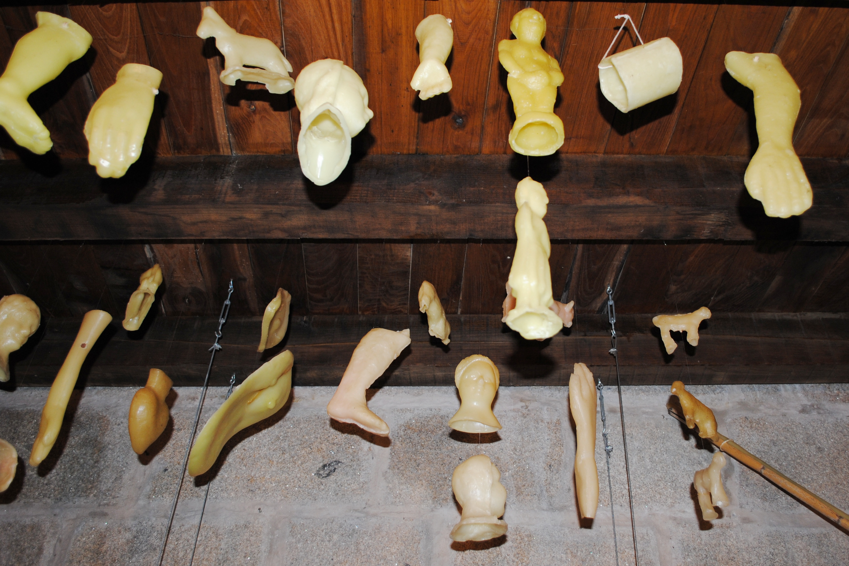 Exvotos expostos no Castelo de Sobroso.